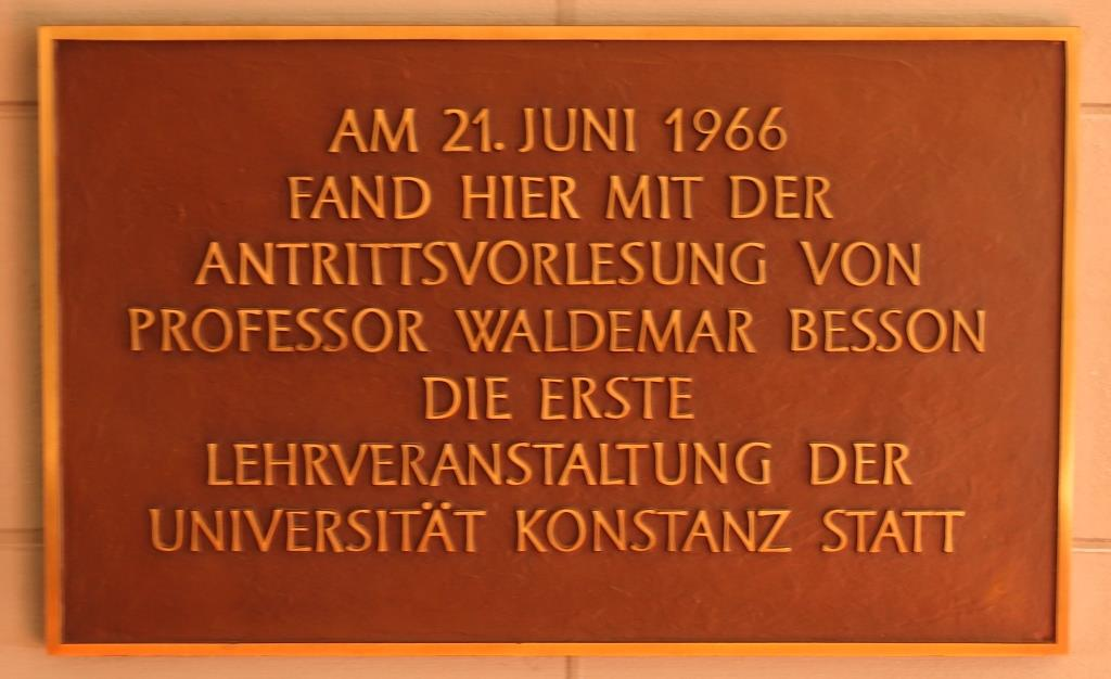 Tafel für den Historiker, Politikwissenschaftler und Publizisten Waldemar Besson (1929-1971) im Inselhotel in Konstanz